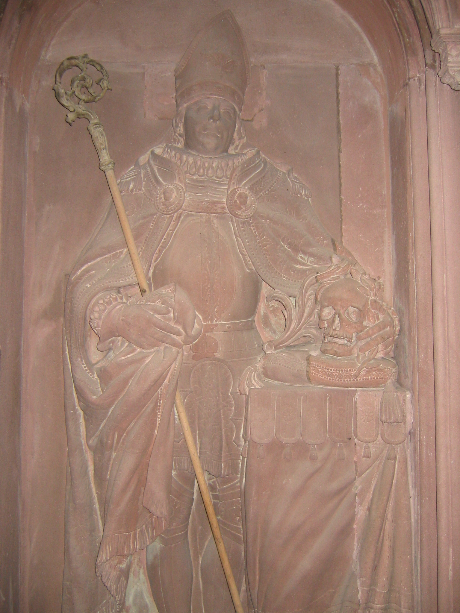 Von Franz Xaver Hauser geschaffene Bildplatte von Rudolf von Zähringen im Freiburg Münster